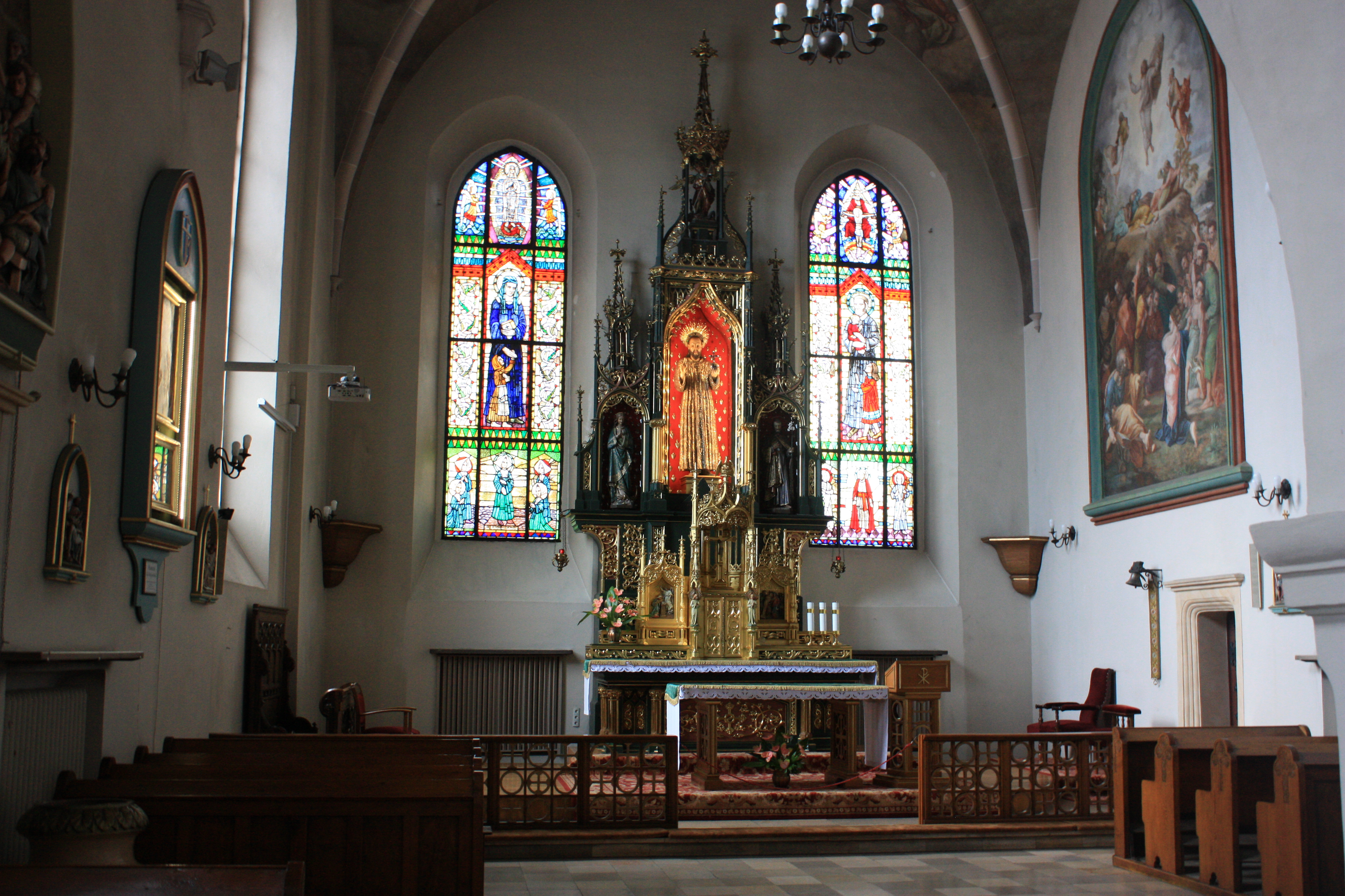 Kościół Przemienienia Pańskiego w Poznaniu. Ołtarz główny.